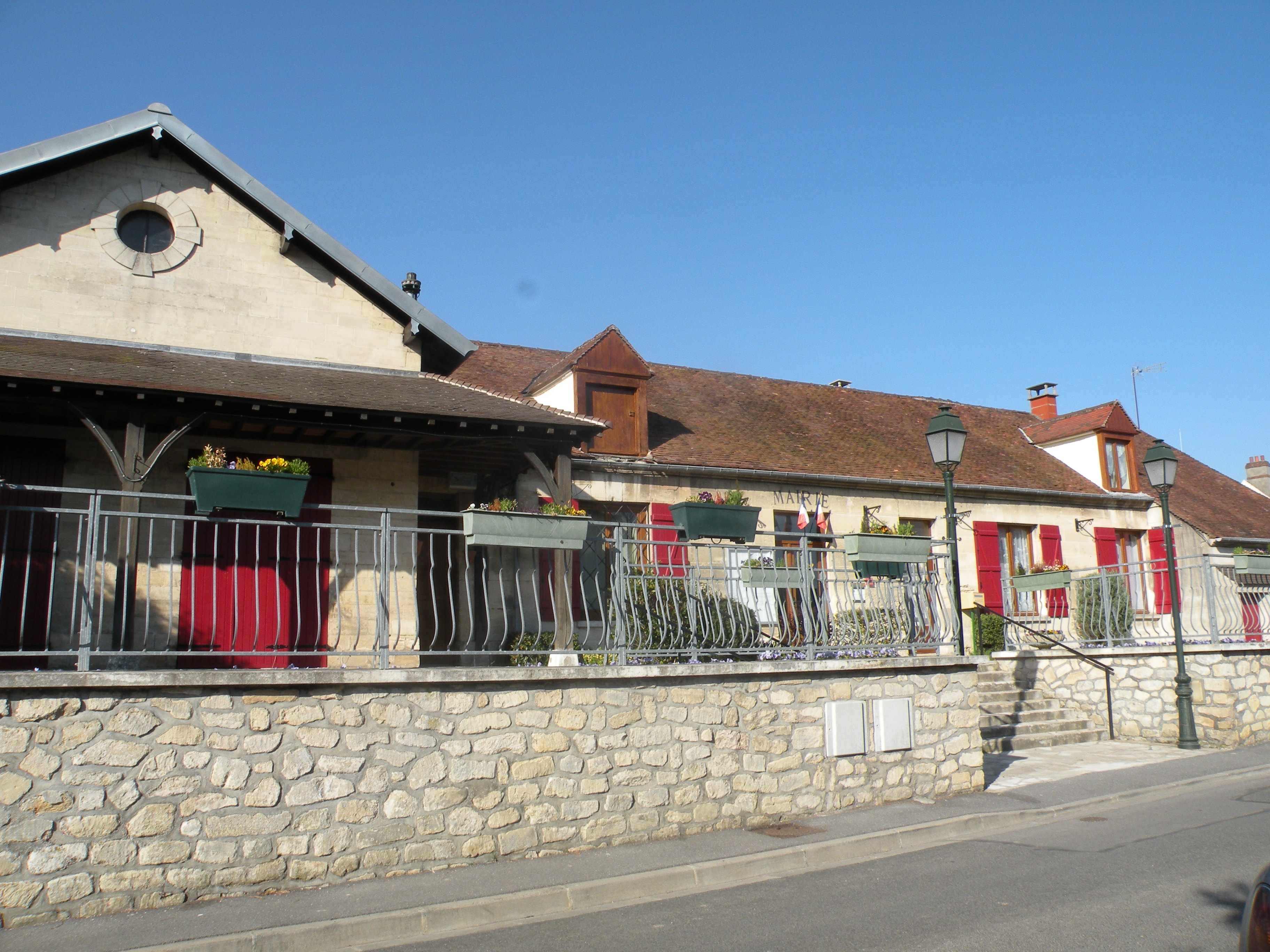 mairie de Le Mesnil-en-Thelle